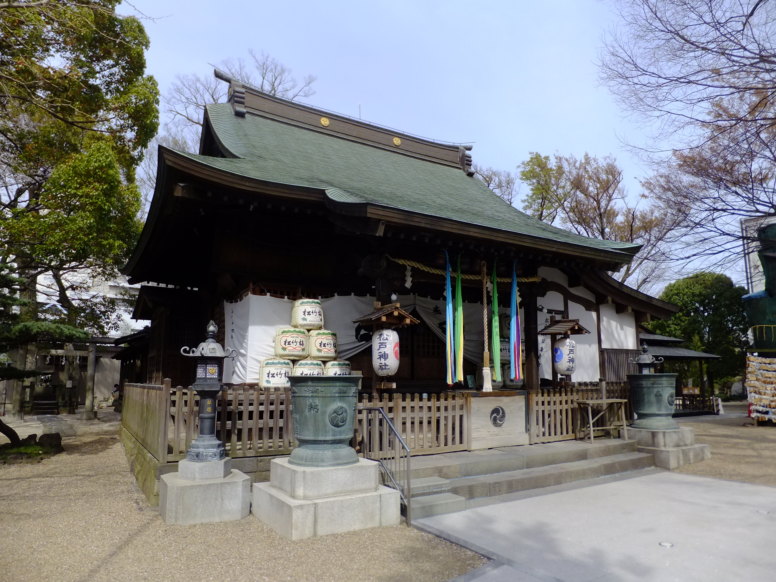 松戸神社拝殿